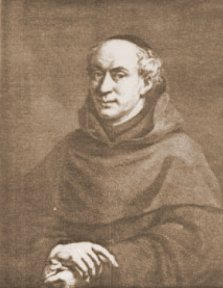 Sebastien Truchet